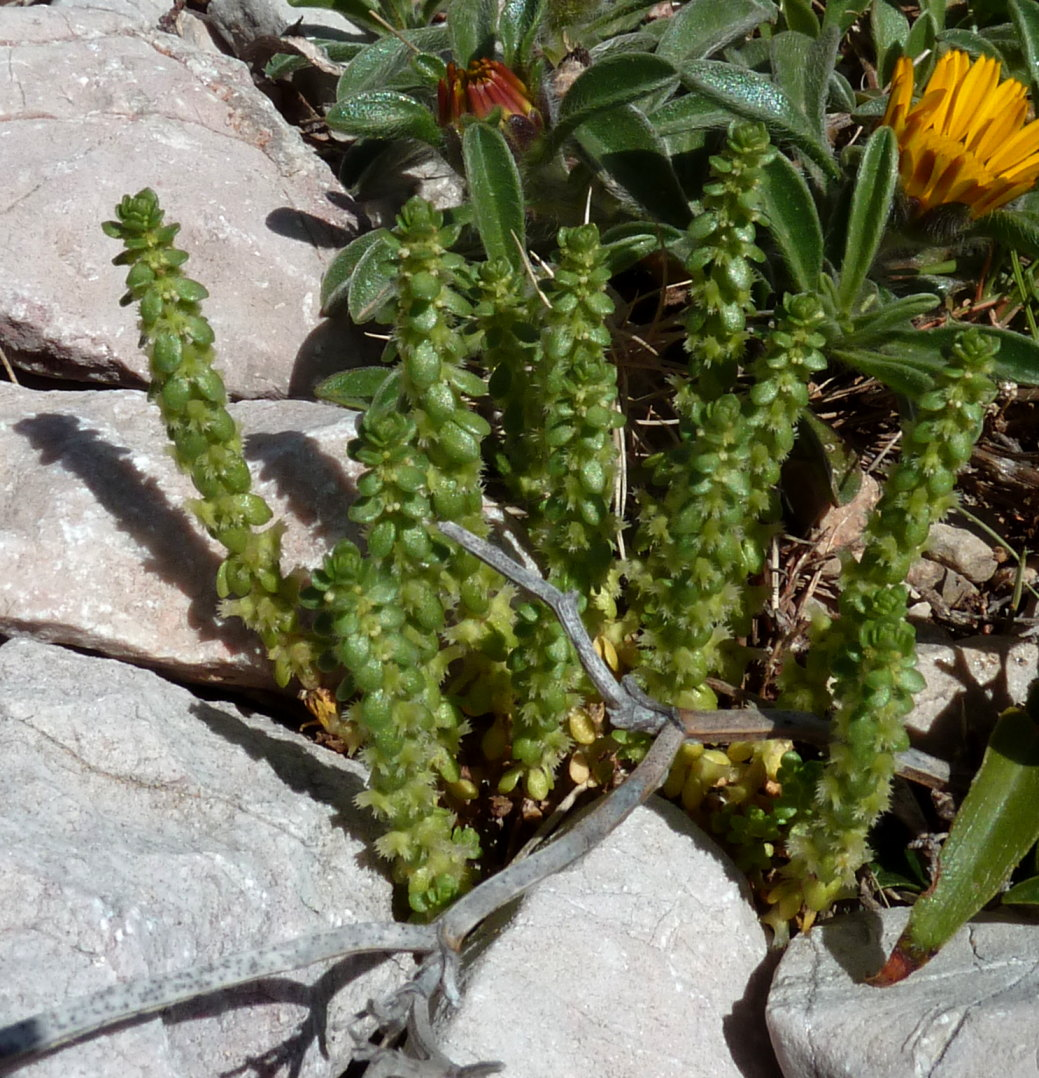 Valantia muralis, pris à la calanque de Callelongue à Marseille (France)